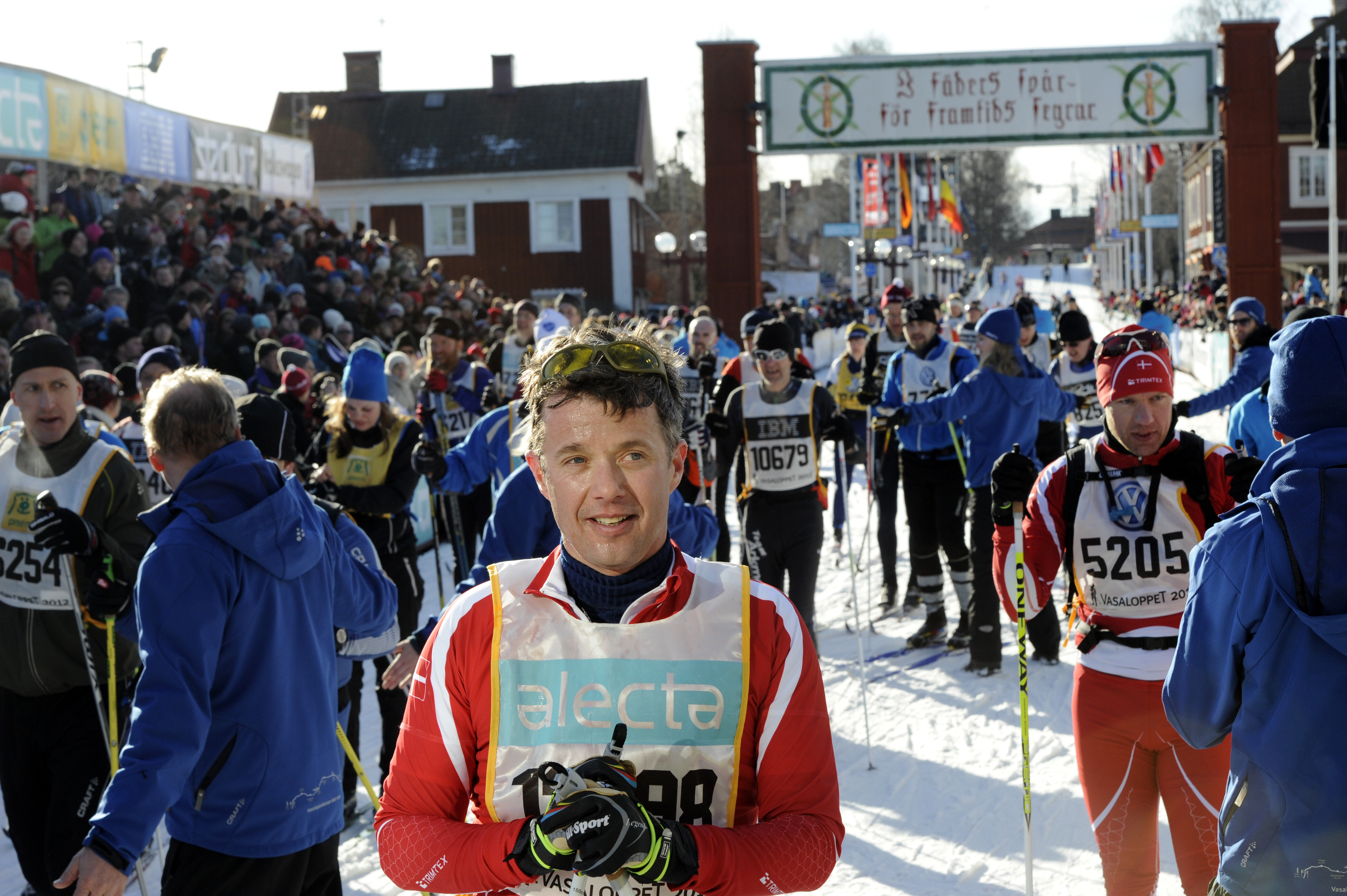 Kronprins Frederik av Danmark efter målgång i Vasaloppet 2012. Kronprinsen åkte de nio milen på 6 timmar, 36 minuter, 32 sekunder.